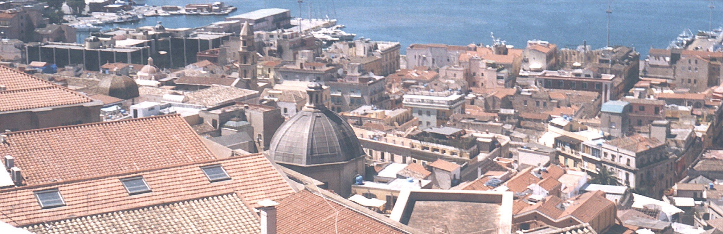 Il quartiere Marina visto dalla Torre dell'Elefante, Cagliari